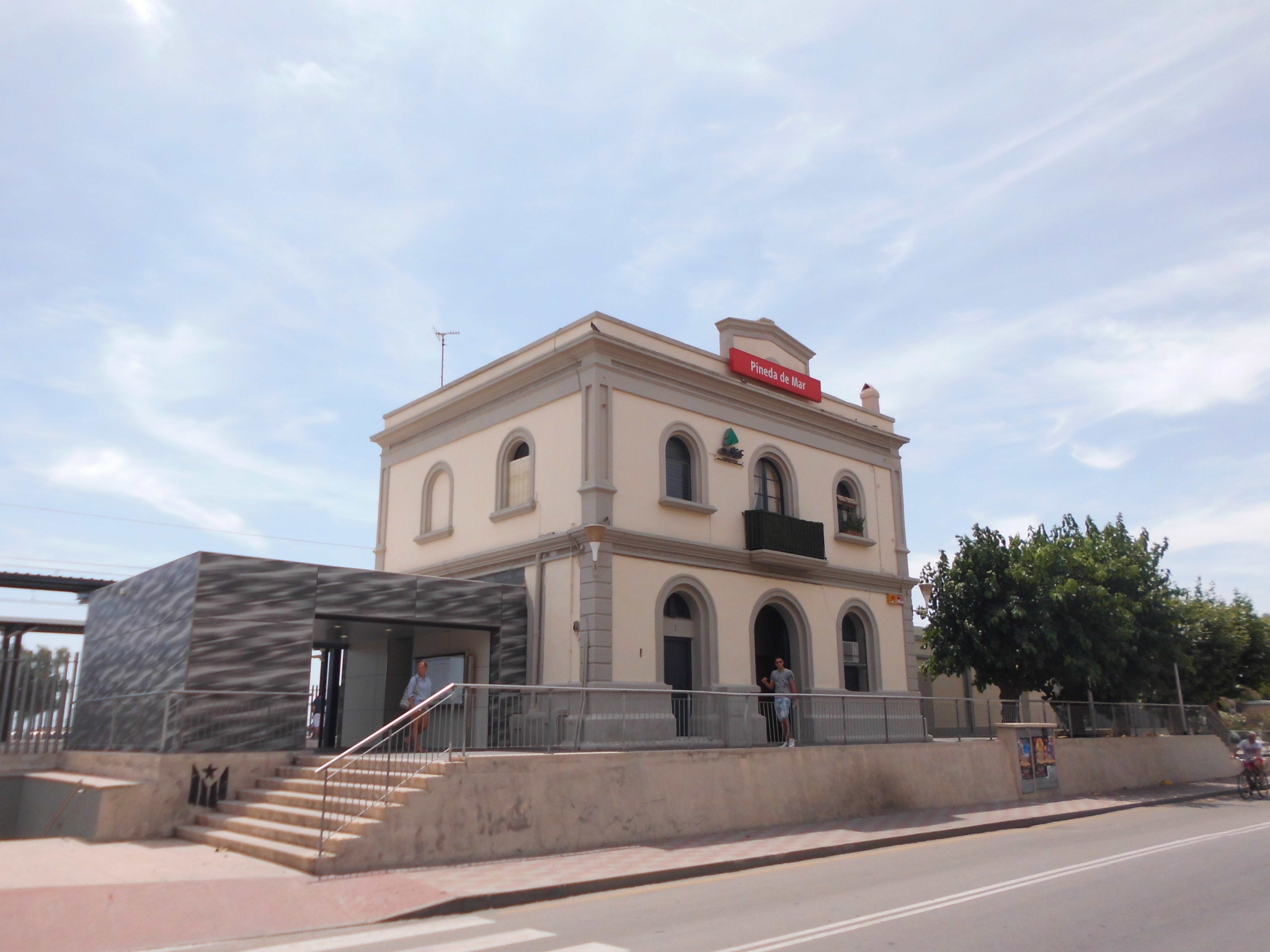 Estació de rodalies de Pineda de Mar (Maresme - Catalunya)